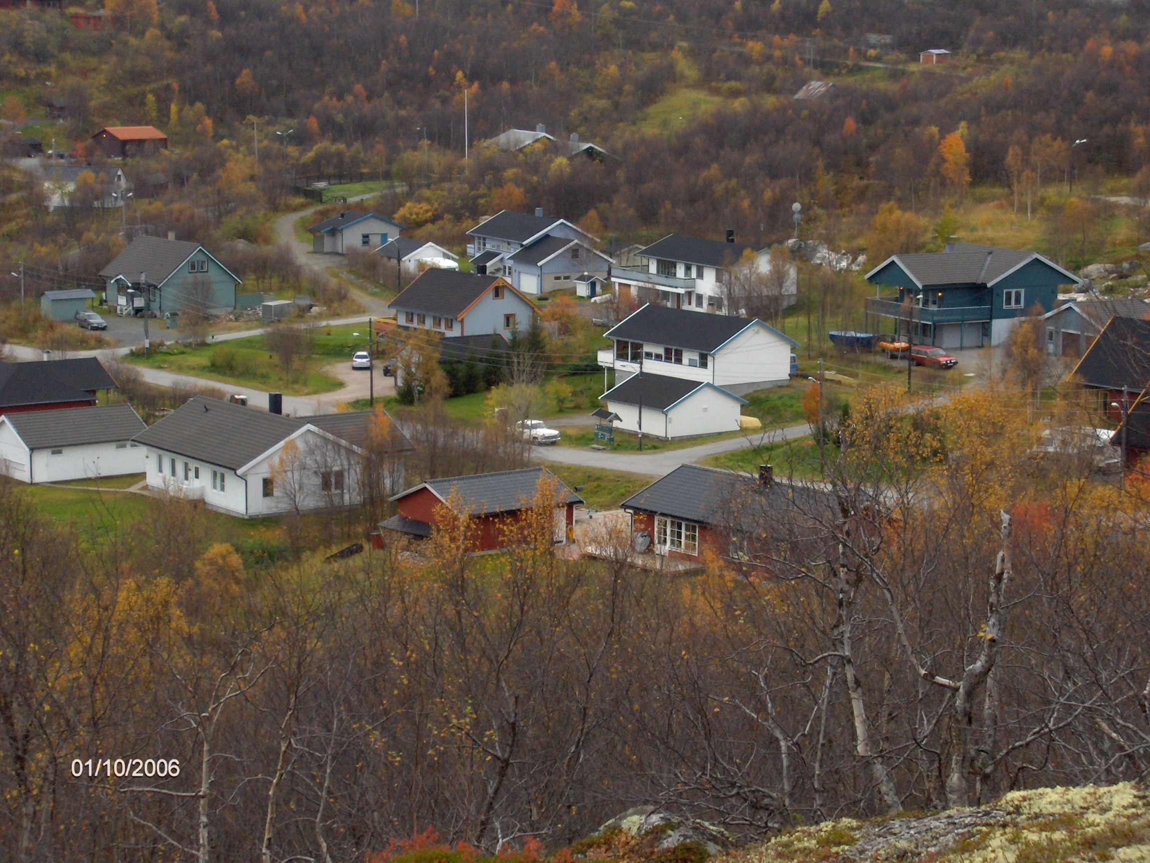 Elvenes, Sør-Varanger, Norway